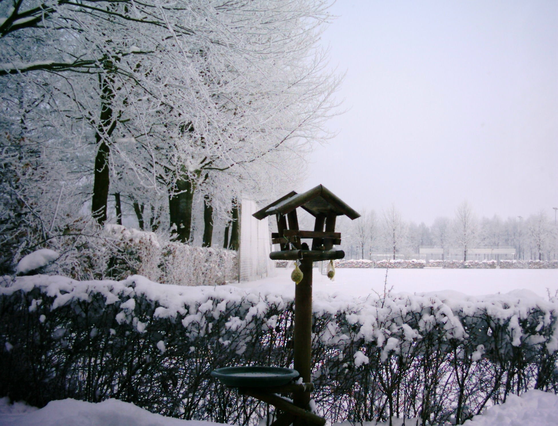 Vetbol